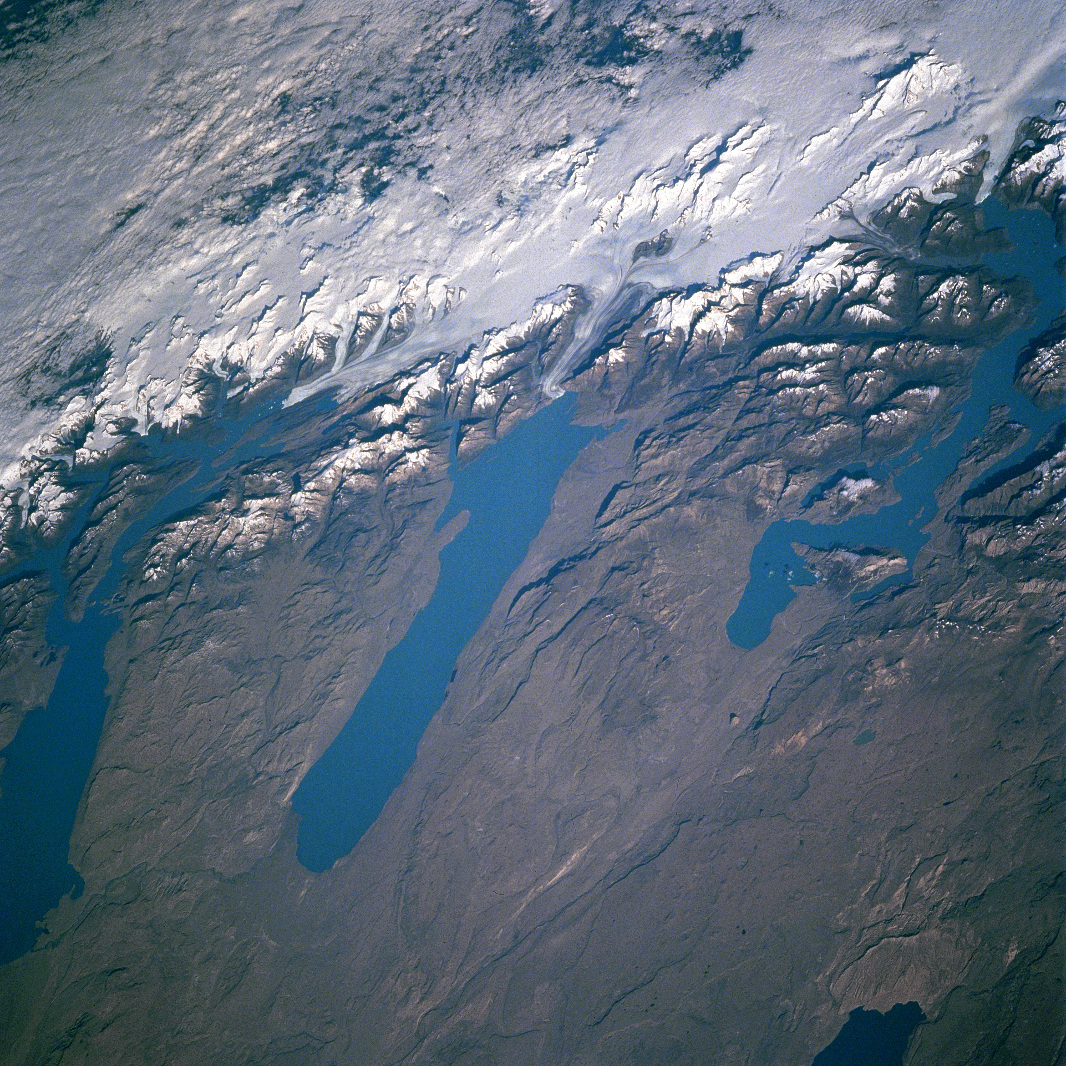 Bild vom Lago Viedma (mitte), Lago Argentino (links) und Lago San Martin (rechts). Von oben (eigentl. Westen) fließt der Viedma-Gletscher in den Viedma-See.